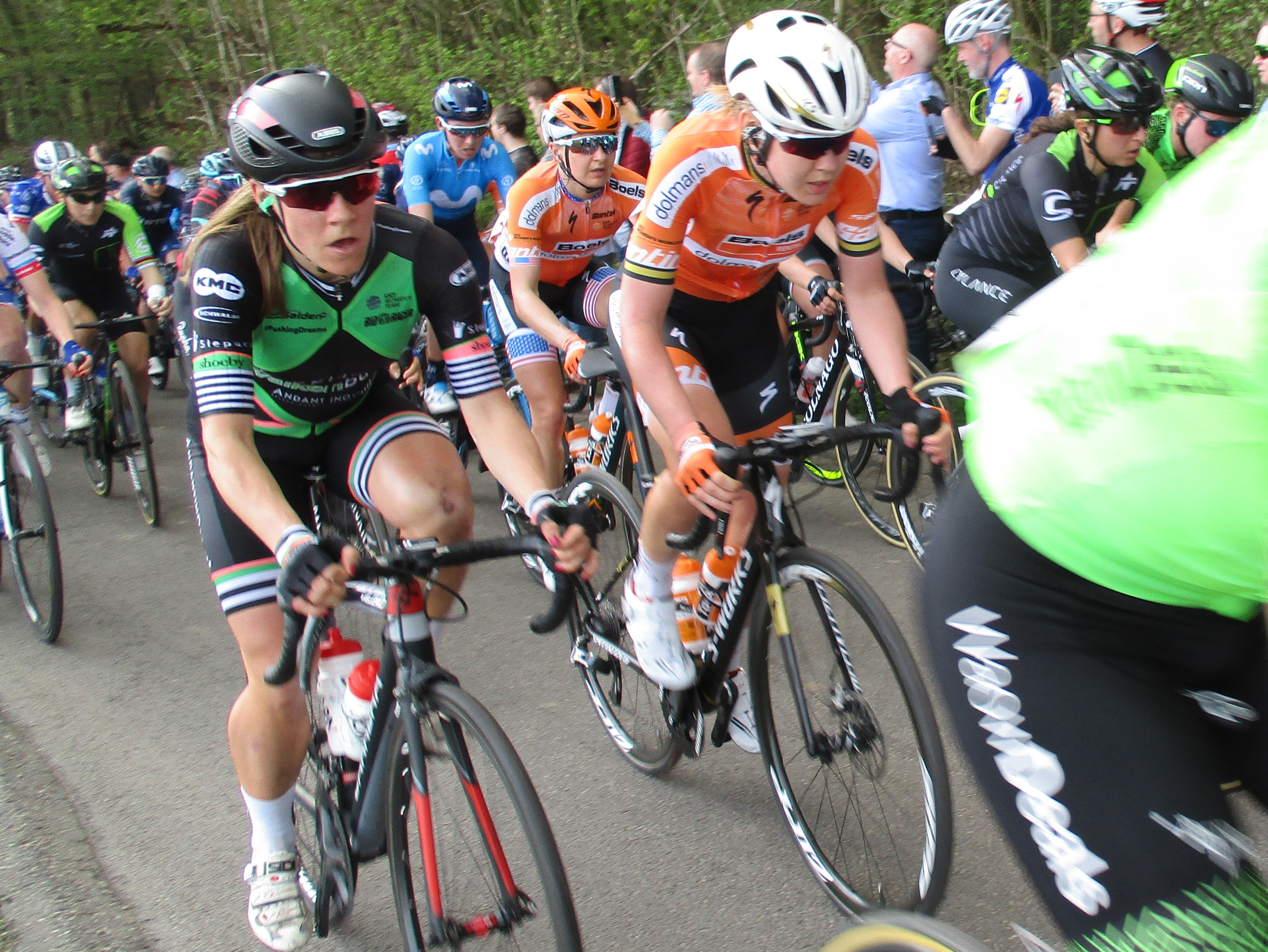 Beklimming Eyserbosweg in de Amstel Gold Race Ladies Edition 2018.